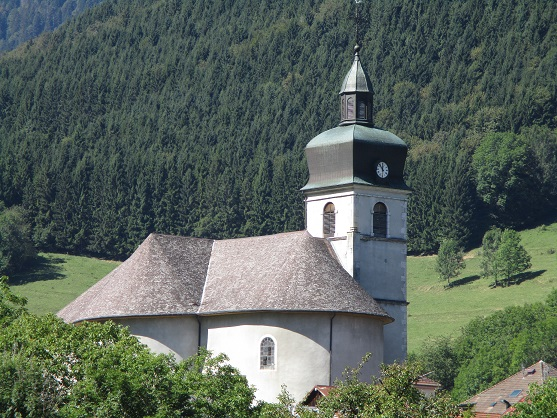 Vue de l'église de Lullin, depuis la route départemeentale